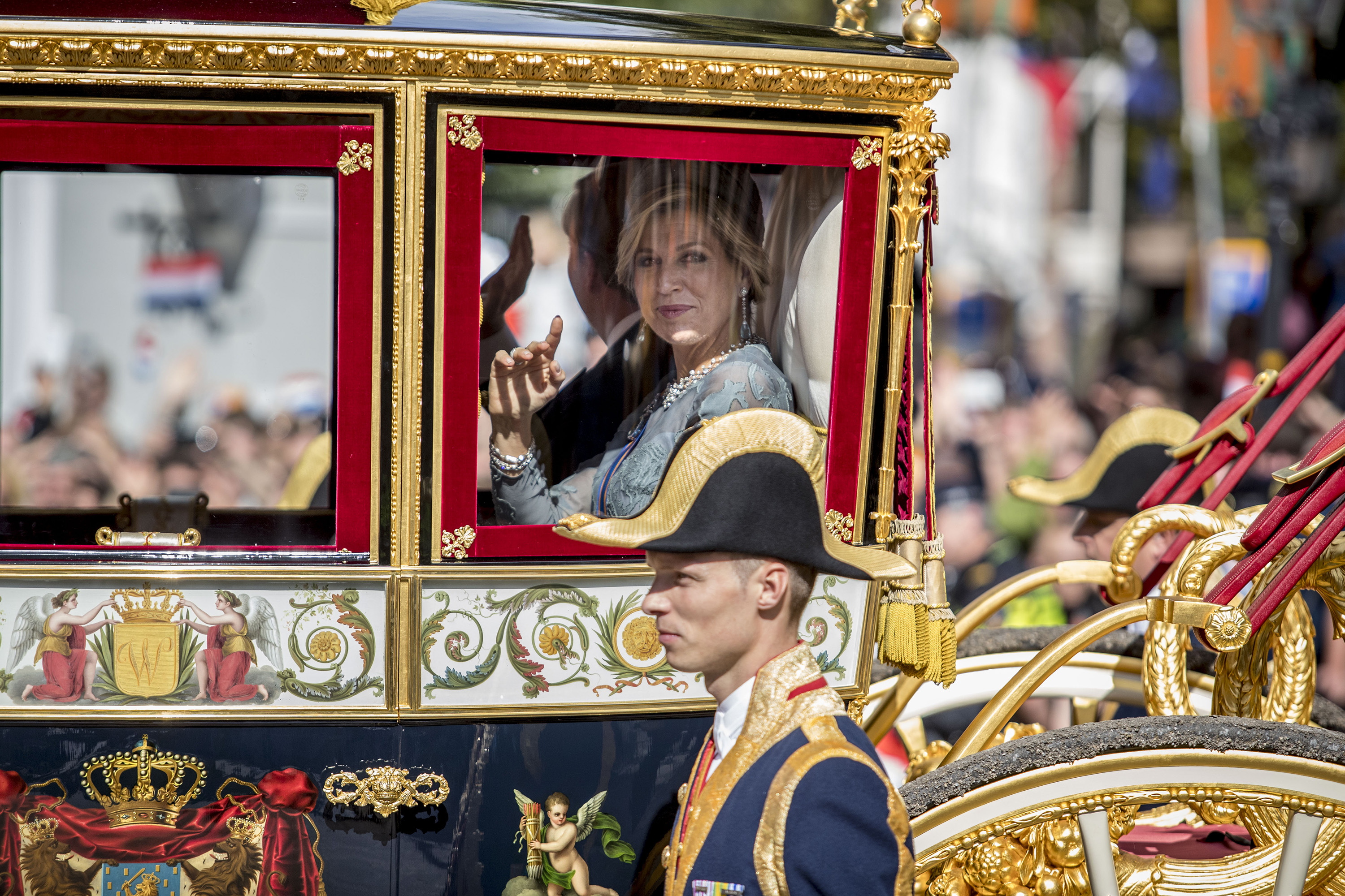 De 3e dinsdag in september en groot militair ceremonieel horen bij elkaar. Aan de plechtigheden op Prinsjesdag doen meer dan 2.000 Defensiemedewerkers mee. Op deze pagina krijgt u een indruk van de ceremoniële ondersteuning die Defensie levert voor Prinsjesdag.